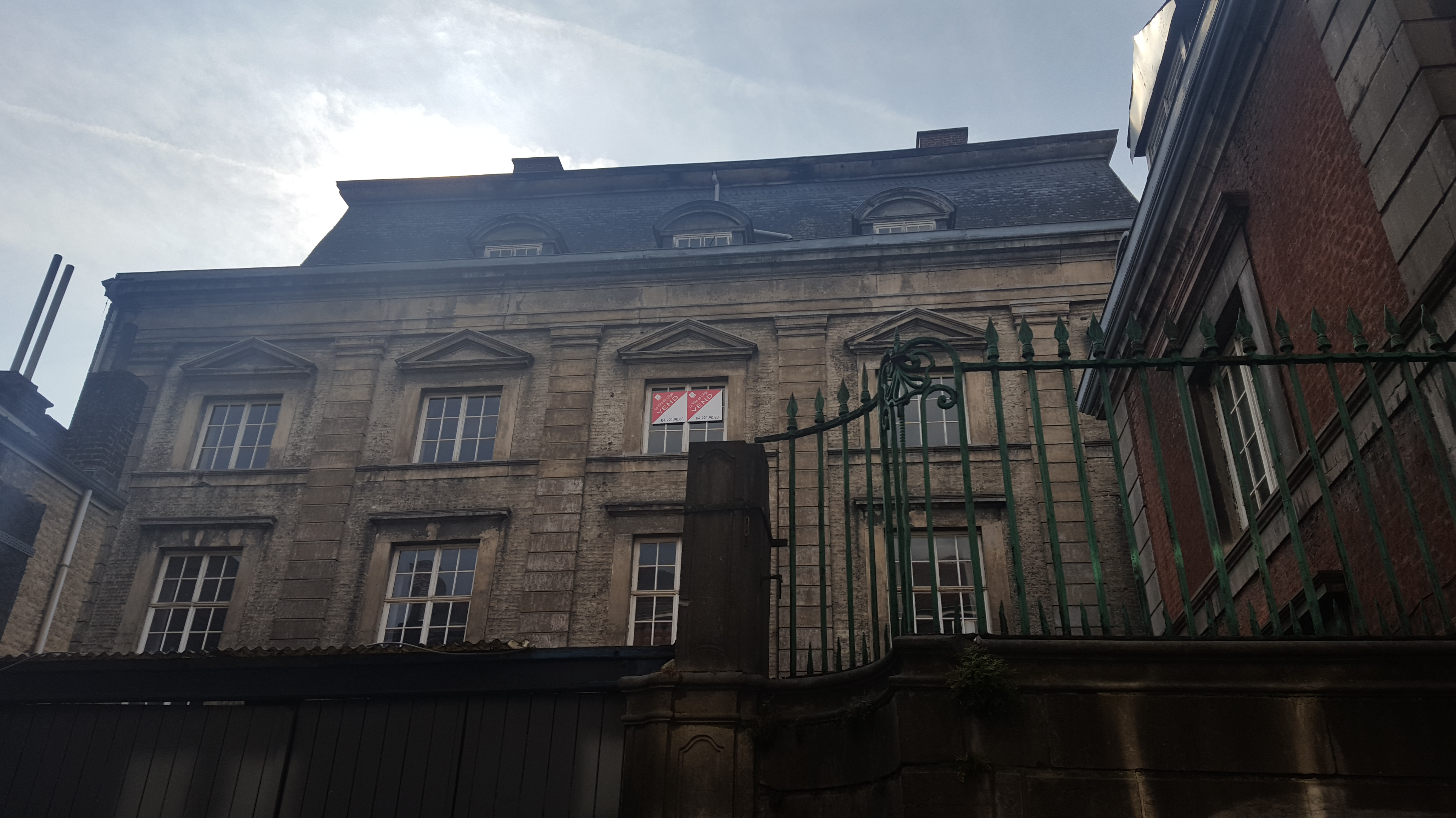 rue des Célestines 14, Liège, Belgique